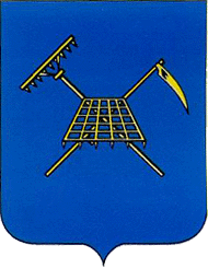 Herb miasteczka Wuzłowe z 1870